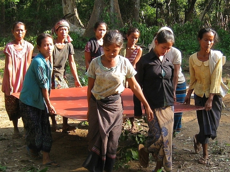 Autore: Toni Rüttimann Descrizione: Donne in Laos trasportano una piastra d'acciaio.